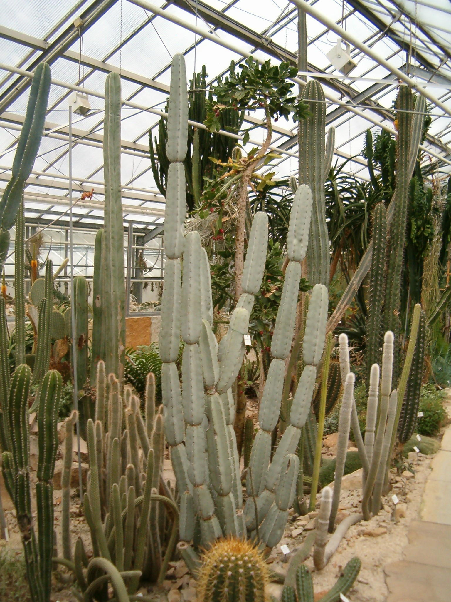 Botanischer Garten Dresden, American Desert Picture taken by: User:BotBln Date: 2007 02 19